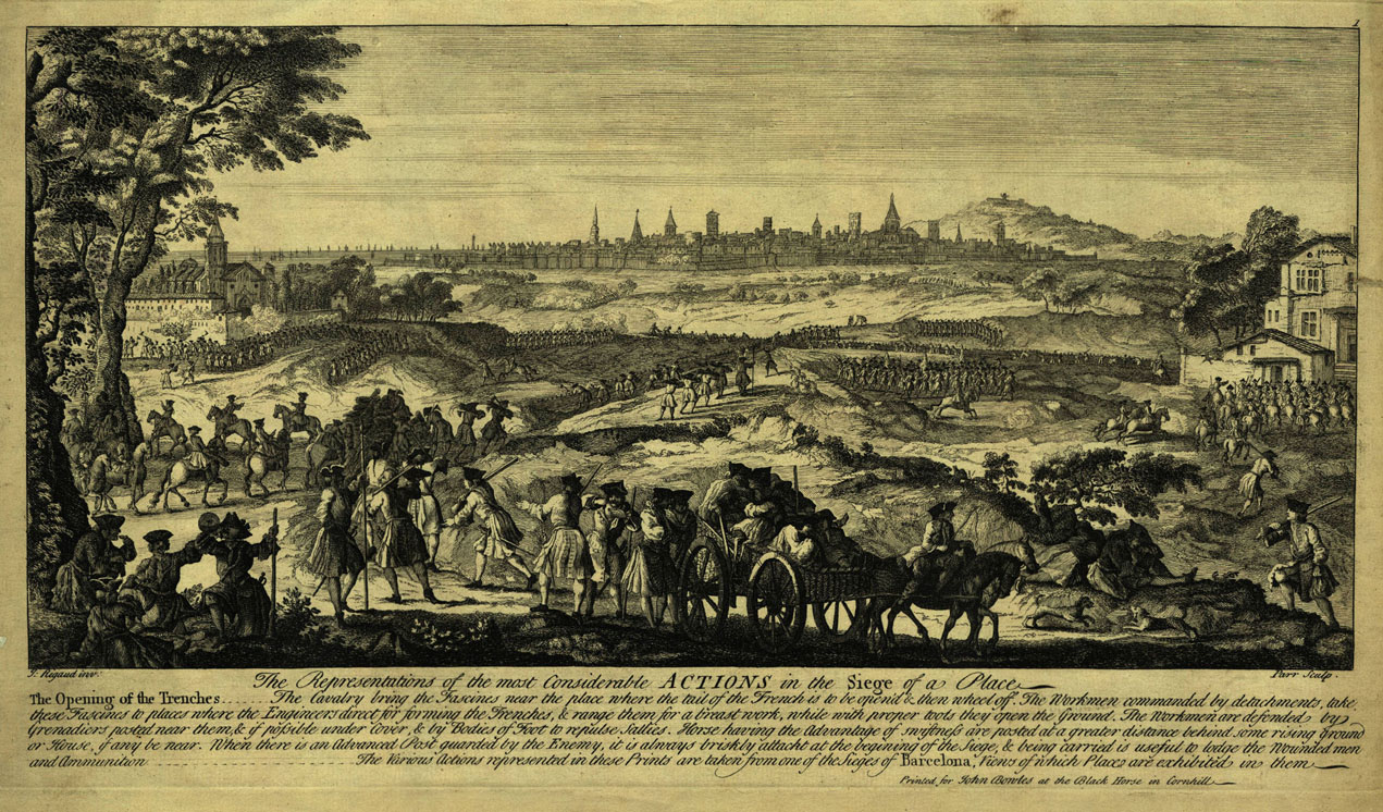 Sitio Barcelona 1714 Obertura Trinchera